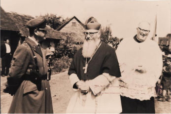 Monseñor Guido Beck de Ramberga en Tolten Chile